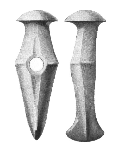 Mångkantig skafthålsyxa. Dalarna